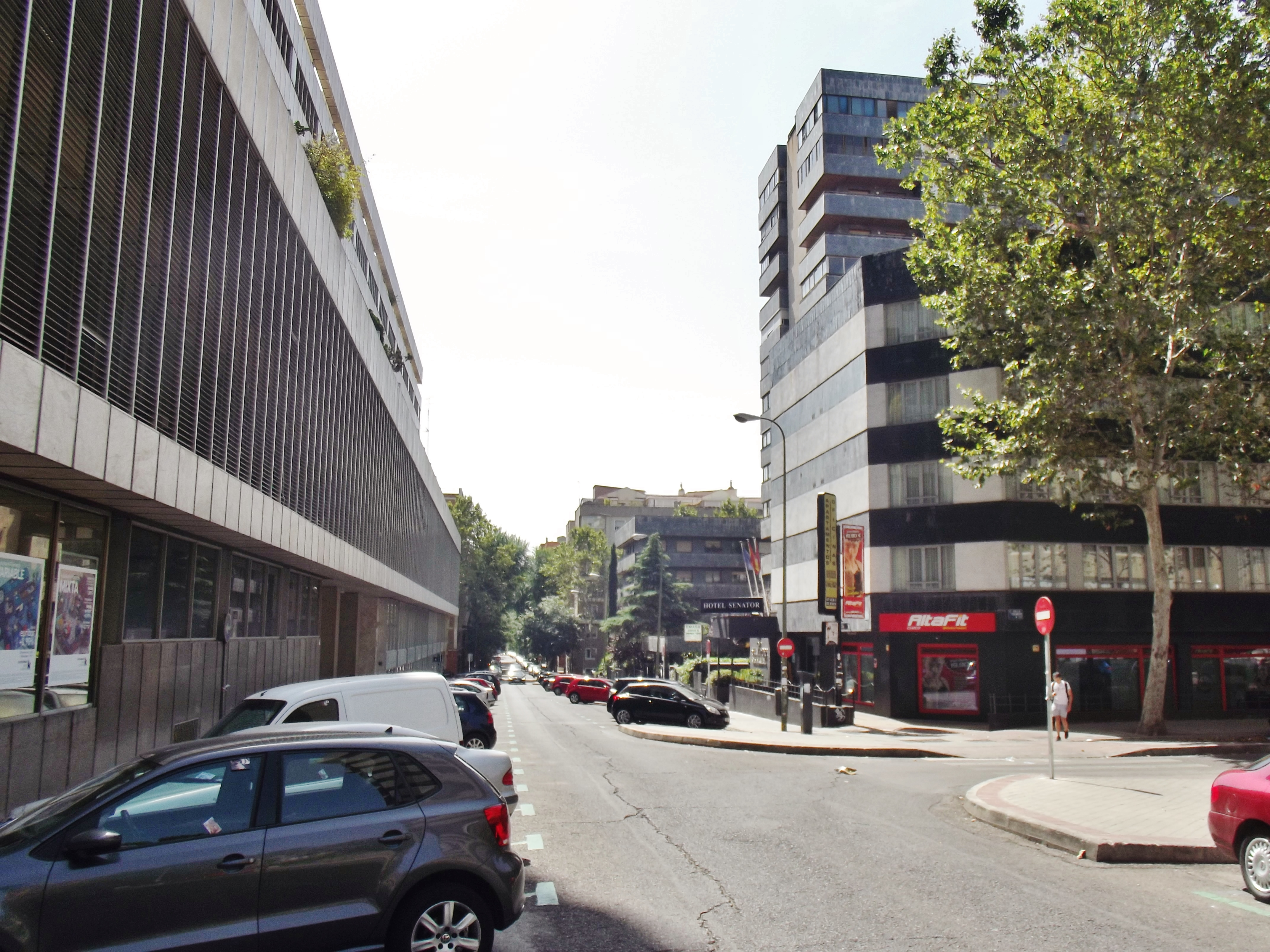 Calle del General Varela, Madrid.